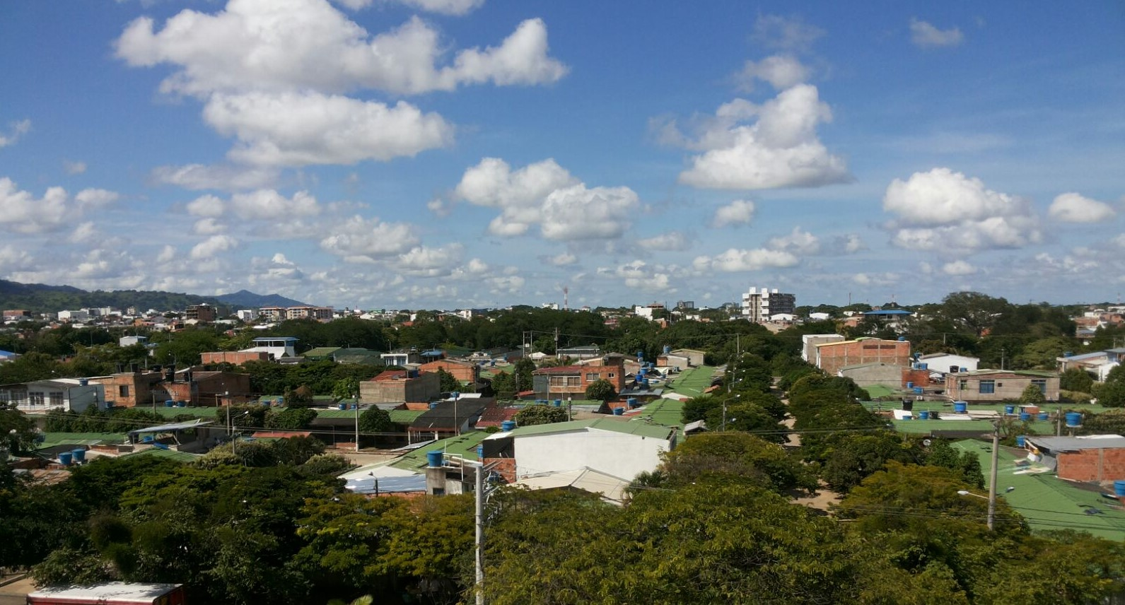 panoramica de yopal